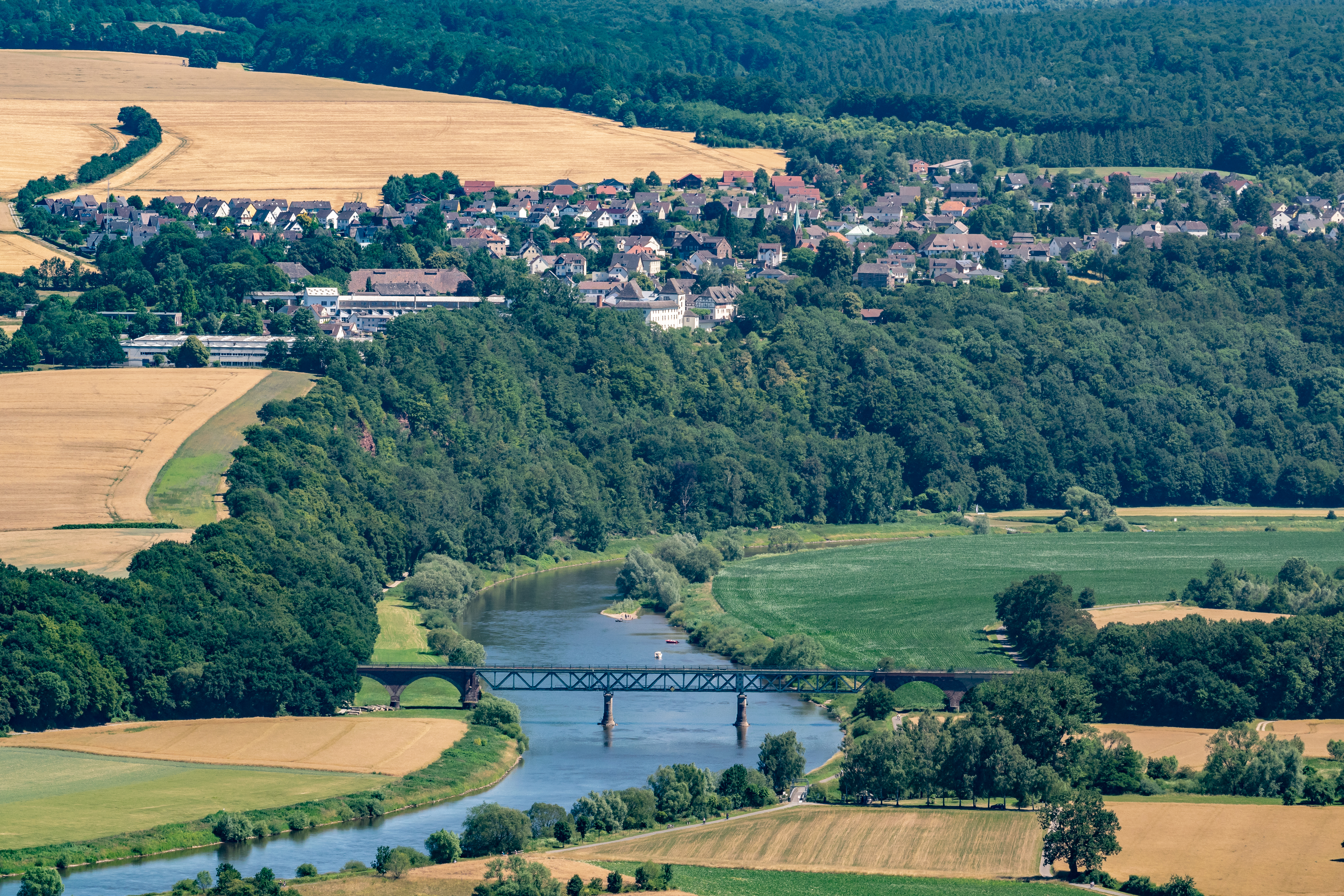 Blick vom Brunsberg in Höxter-Godelheim Richtung Südosten; Weserschleife mit Fürstenberg